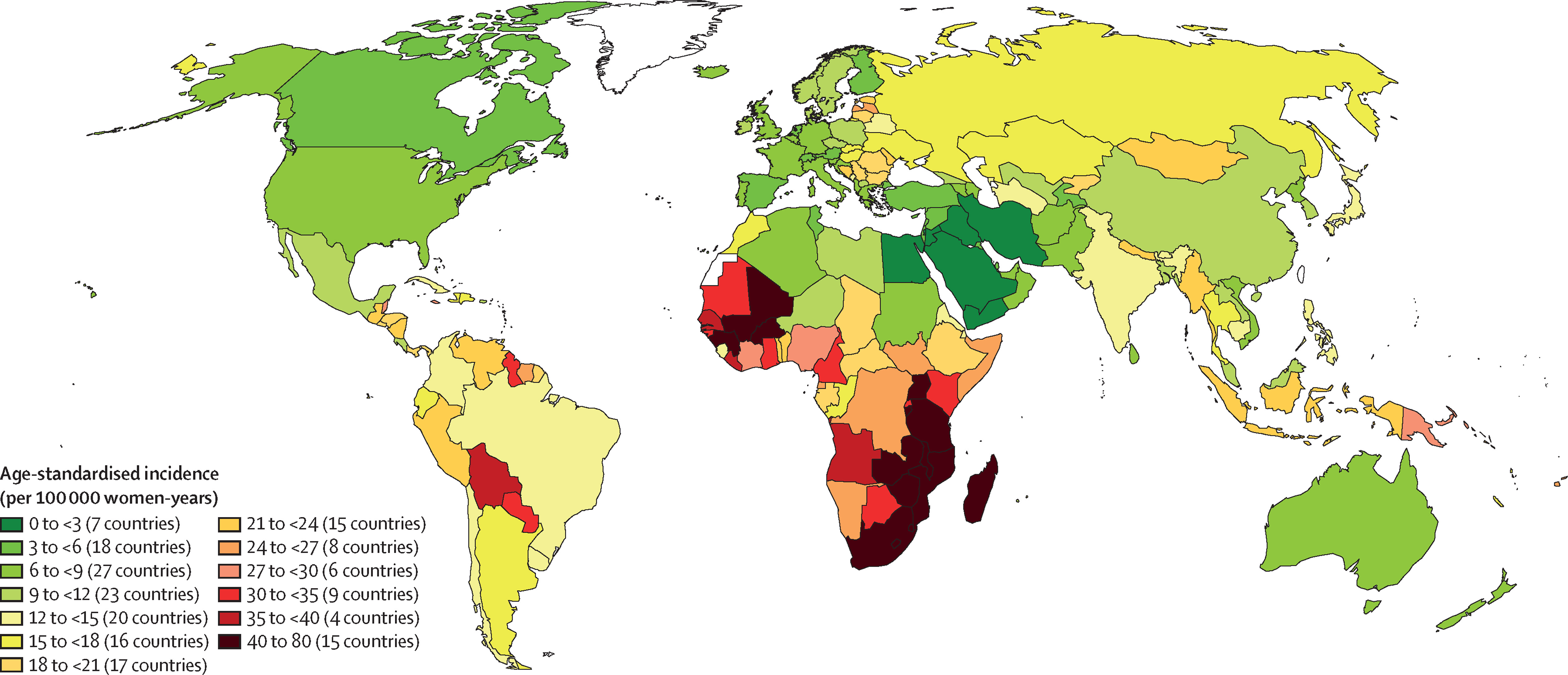 Nombre de nouveau cancer apparaissant chaque année dans chaque pays du monde